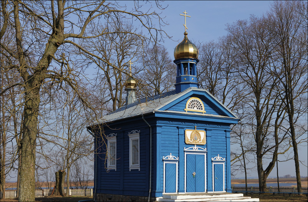 Пацавічы. Царква Раства Багародзіцы